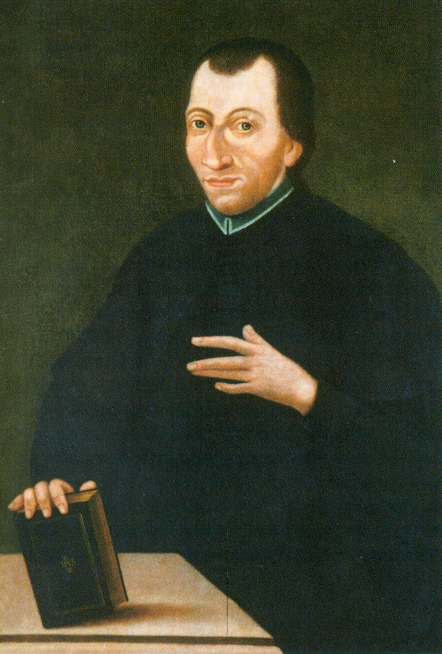 Portrét rožnavského biskupa Antona Andrássyho je dielom maliara Andreasa Pachera, Múzeum Kaštieľ Betliar.